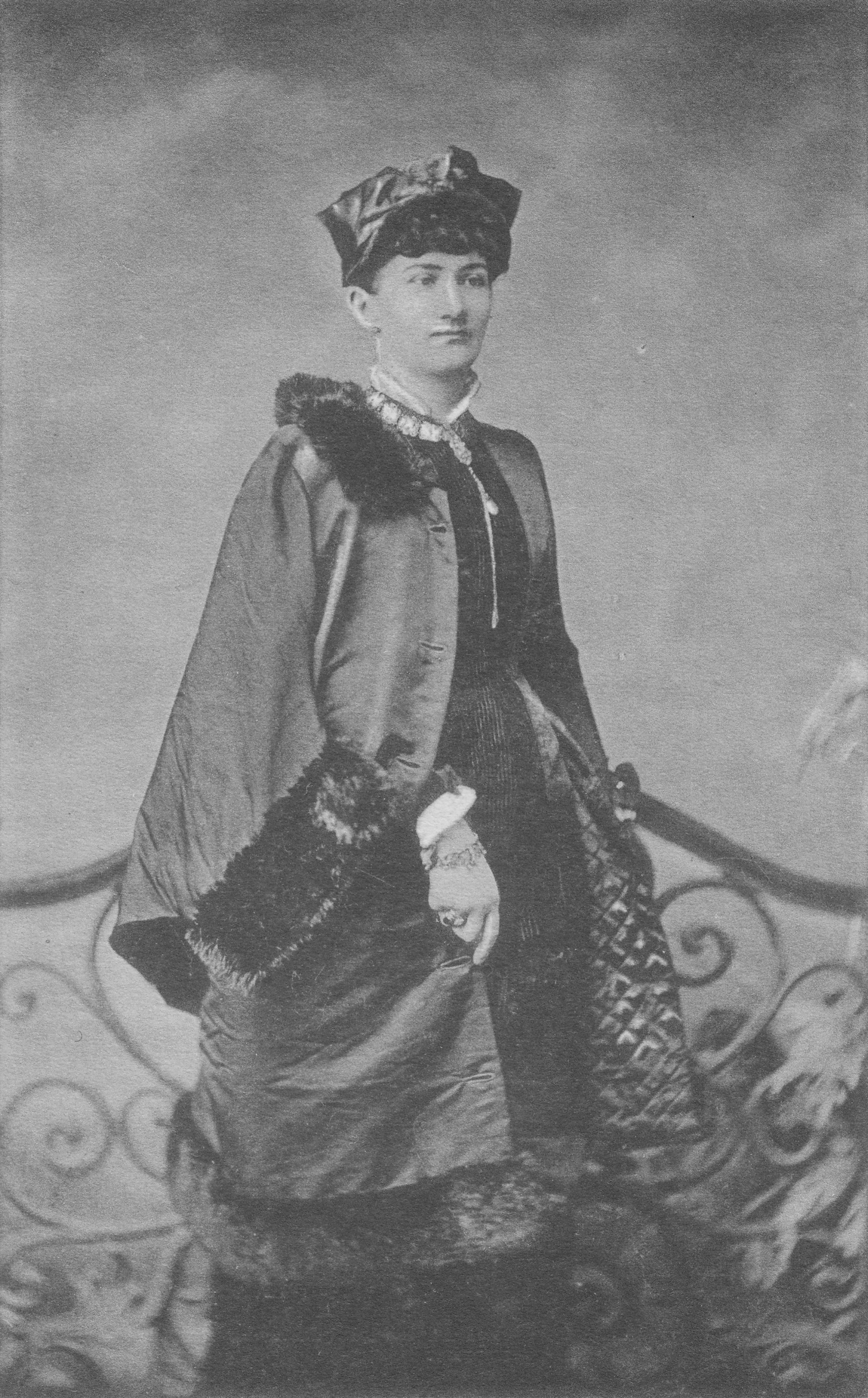 Klementina Kalašová. Fotografie Pokorného & Reutera ve Vídni asi 1875